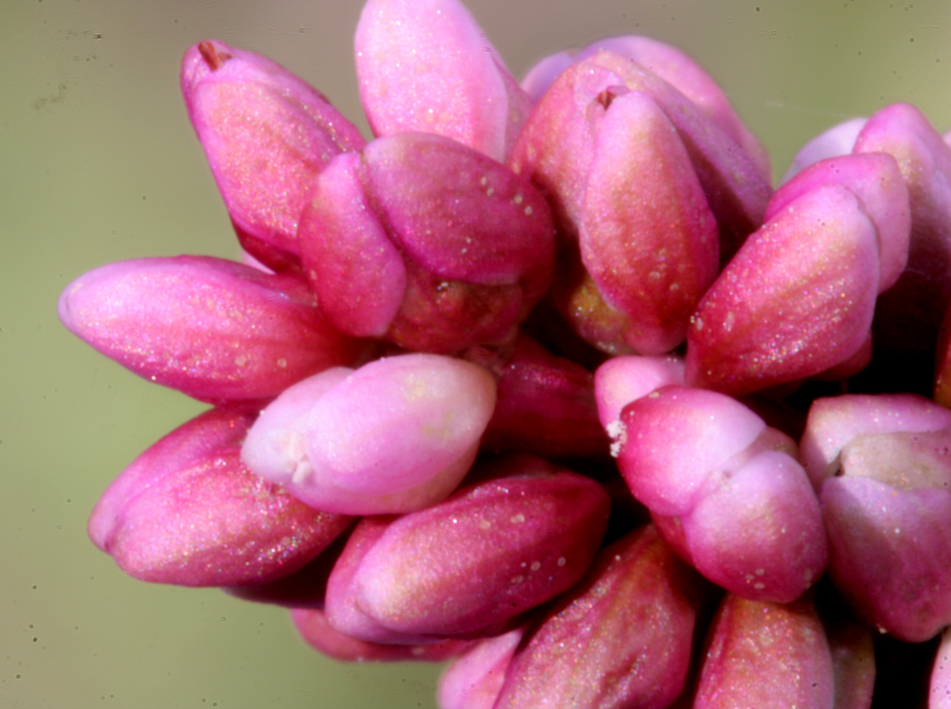 Persicaria_maculosa (sinonimo Polygonum persicaria) Località Villa Prima, Limana (BL), quota 350 m s.l.m.